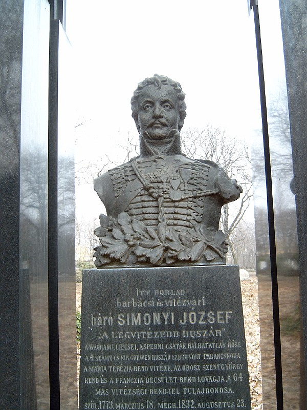 Simonyi József, báró (Nagykálló, 1777. febr. 18. – Arad, 1837. okt.) huszár ezredes, óbester sírja Budapesten. Kerepesi temető: 18/1-1-6 [kivitelező: Gerenday-cég].